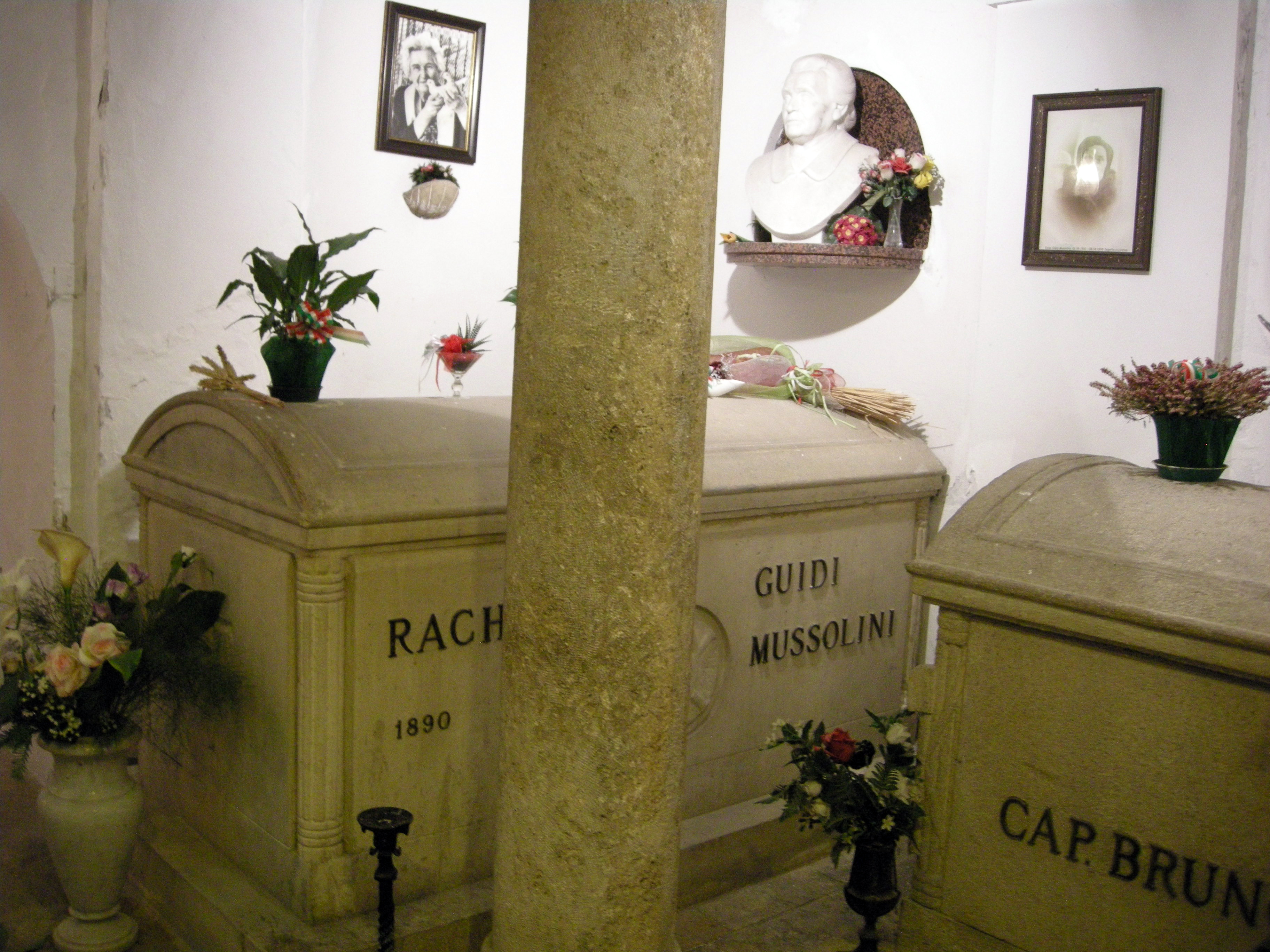 Cripta del cimitero di San Cassiano a Predappio, tombe della famiglia Mussolini